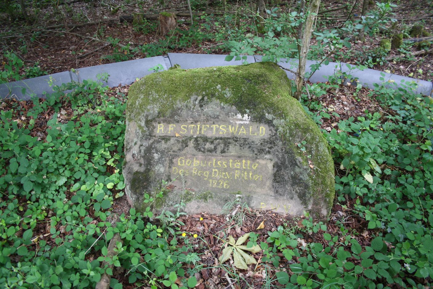 Ritterstein Nummer 161, R. F. Stiftswald Geburtsstätte des Reg. Dir. v. Ritter 1836